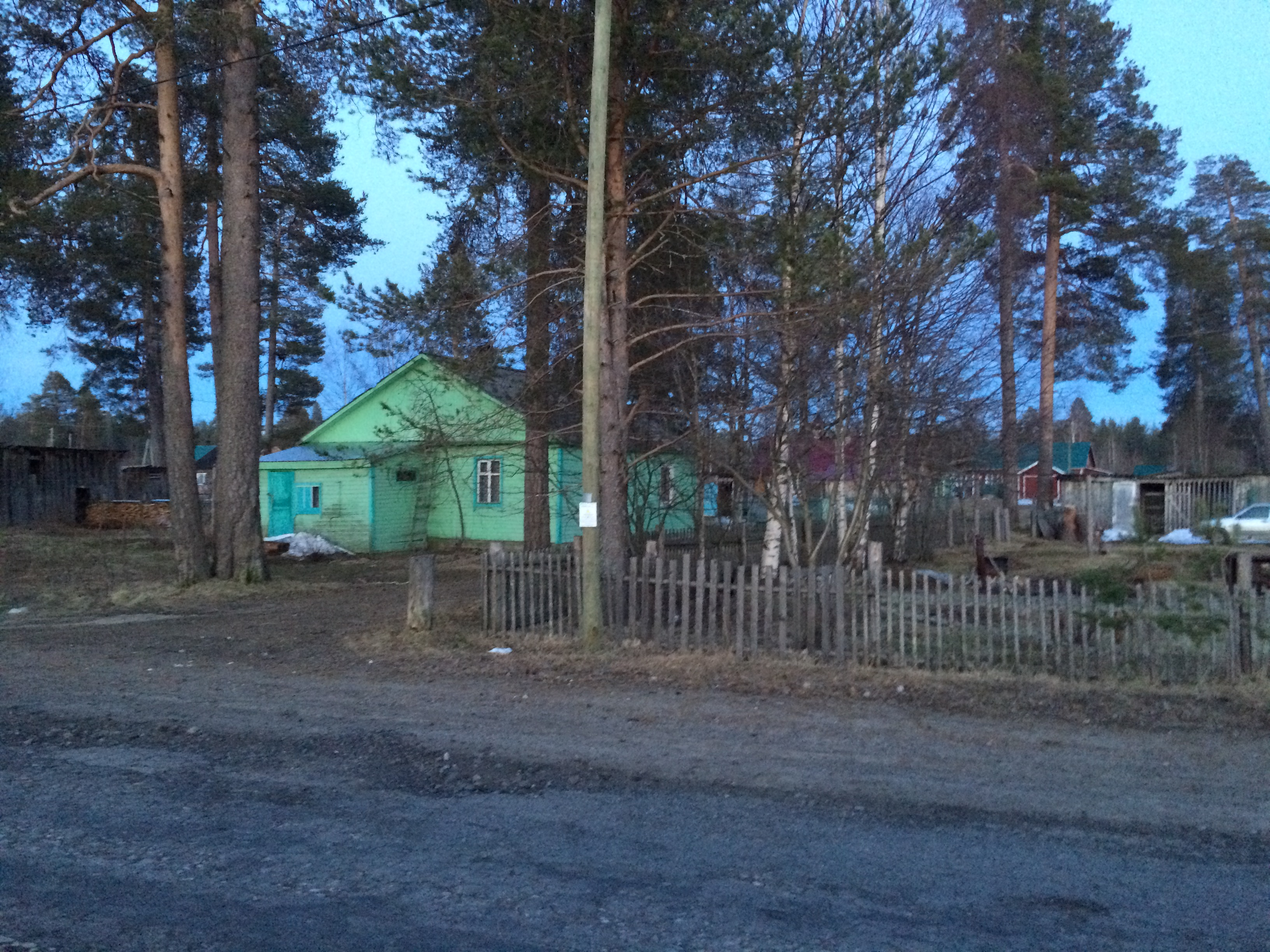 пос. Кепа